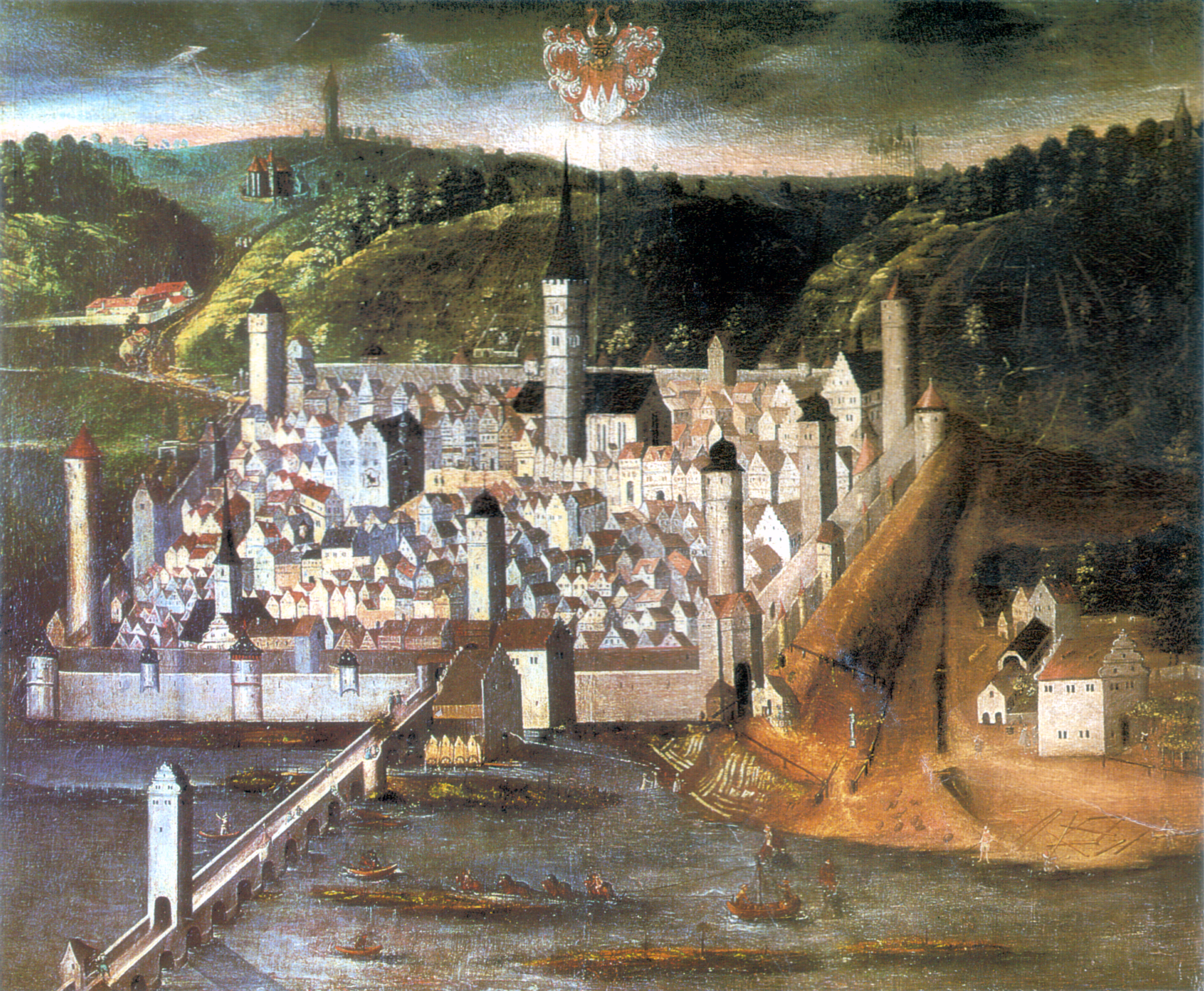 Ochsenfurt, 1623, Ölgemälde im Rathaus Ochsenfurt